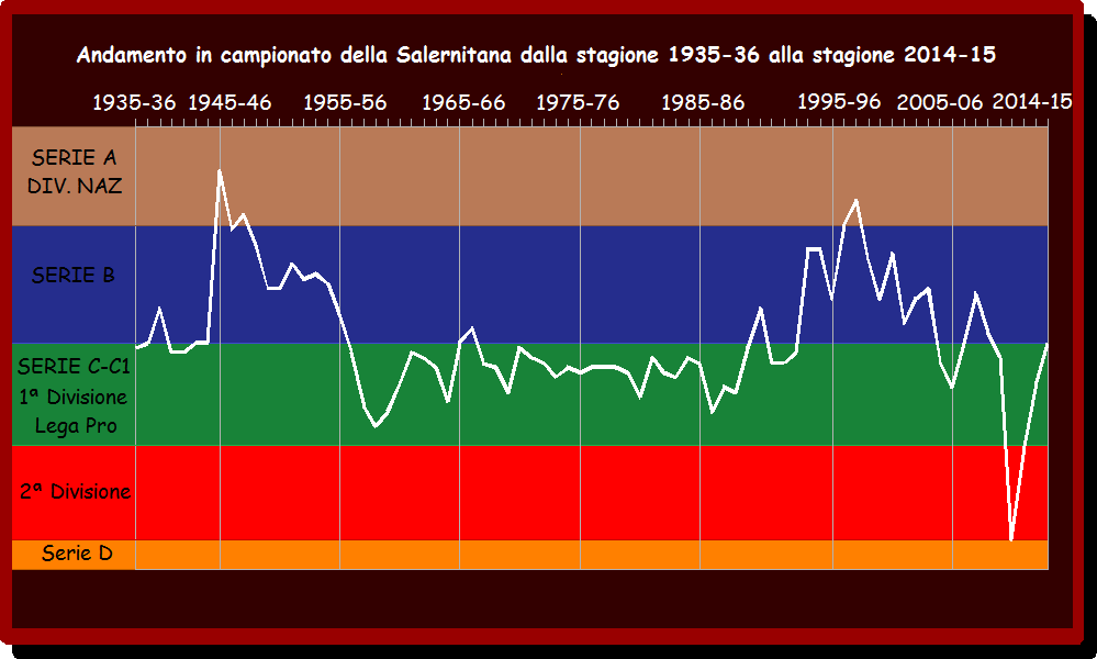 Grafico di andamento in campionato della Salernitana dalla stagione 1935-1936 alla stagione 2014-2015